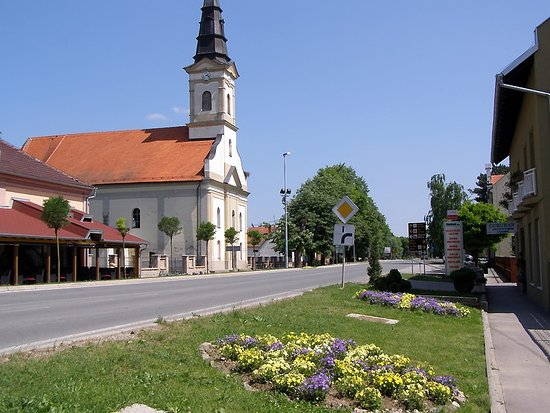 Katolička crkva Svetog Martina u Bošnjacima